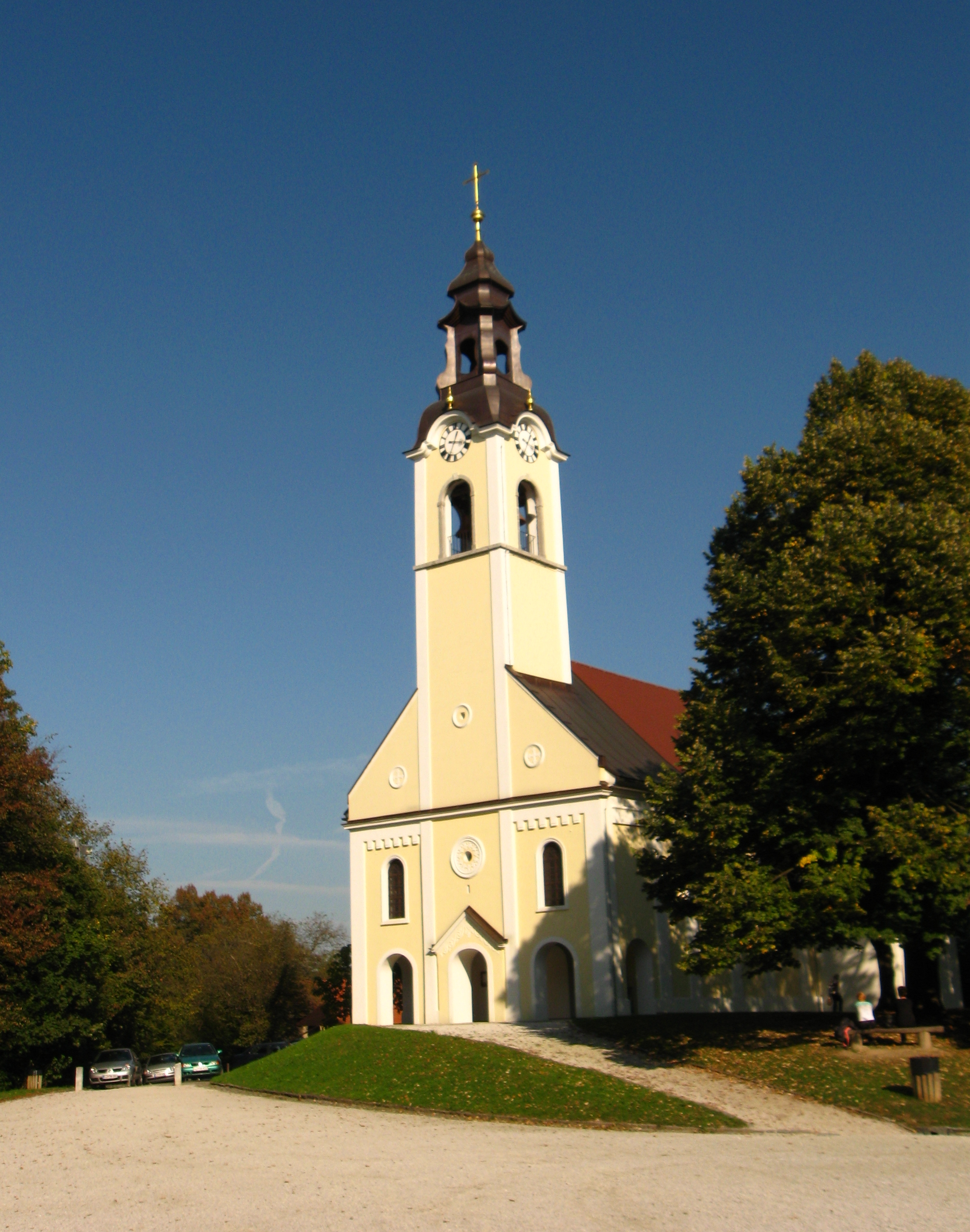 Урх код Љубљане. Словенија.